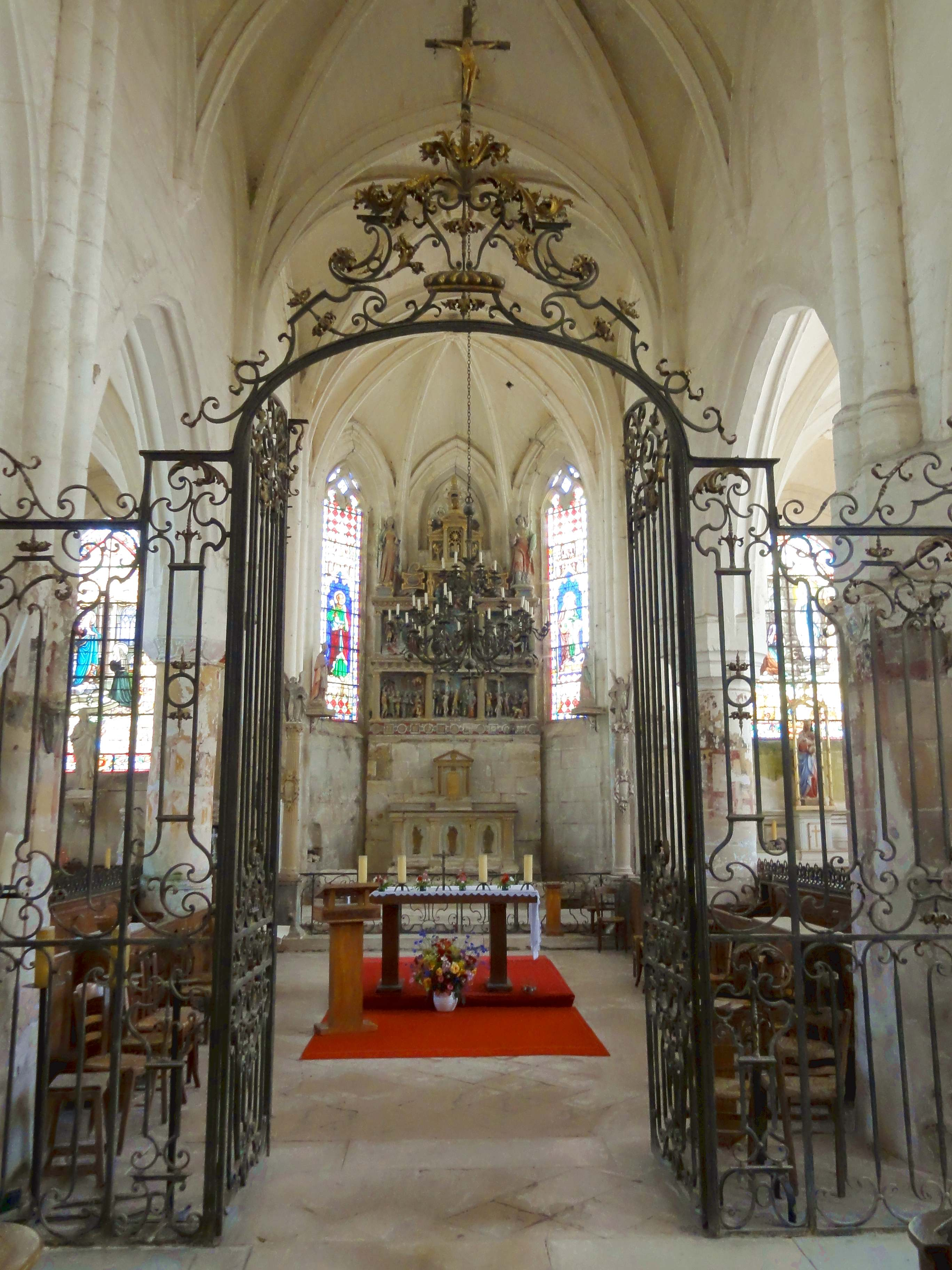 Intérieur de l'église (voir titre).